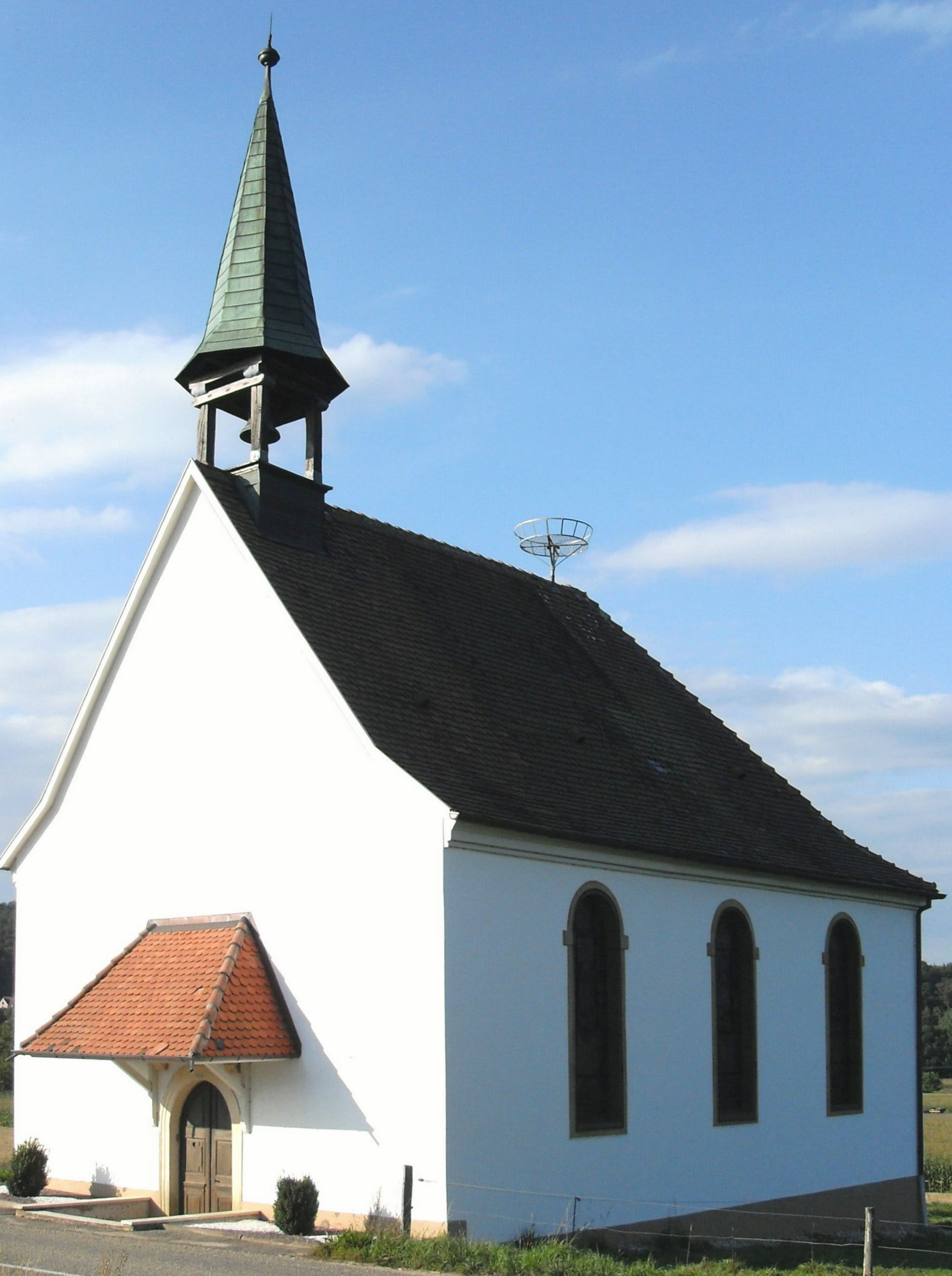 La chapelle de Mariabrunn à Raedersdorf